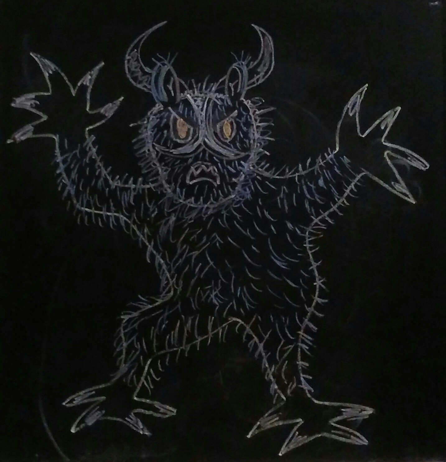 Il·lustració del Butoni